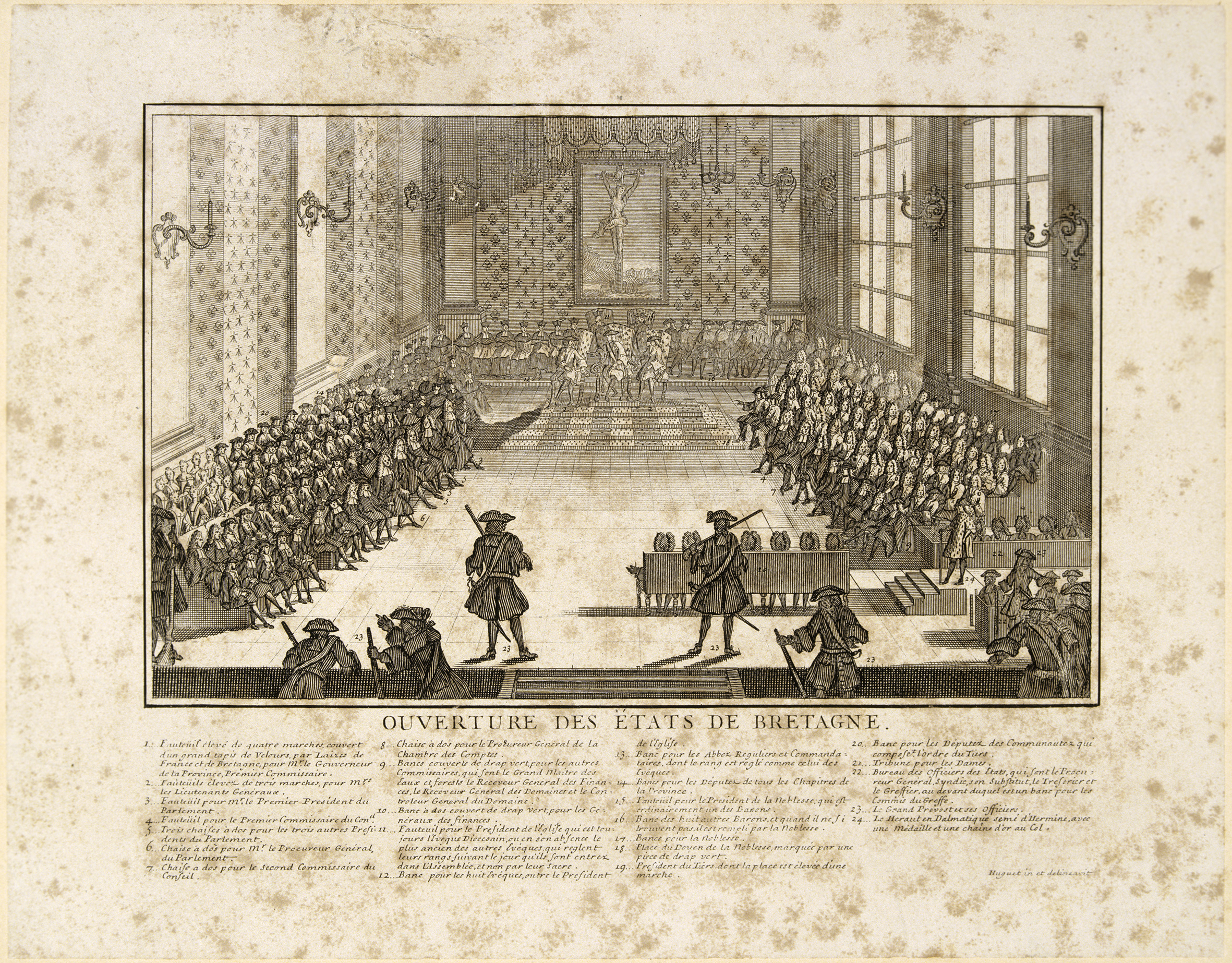 Extrait de la Description historique, topographique et naturelle de l'ancienne Armorique par Christophe-Paul de Robien (1756).